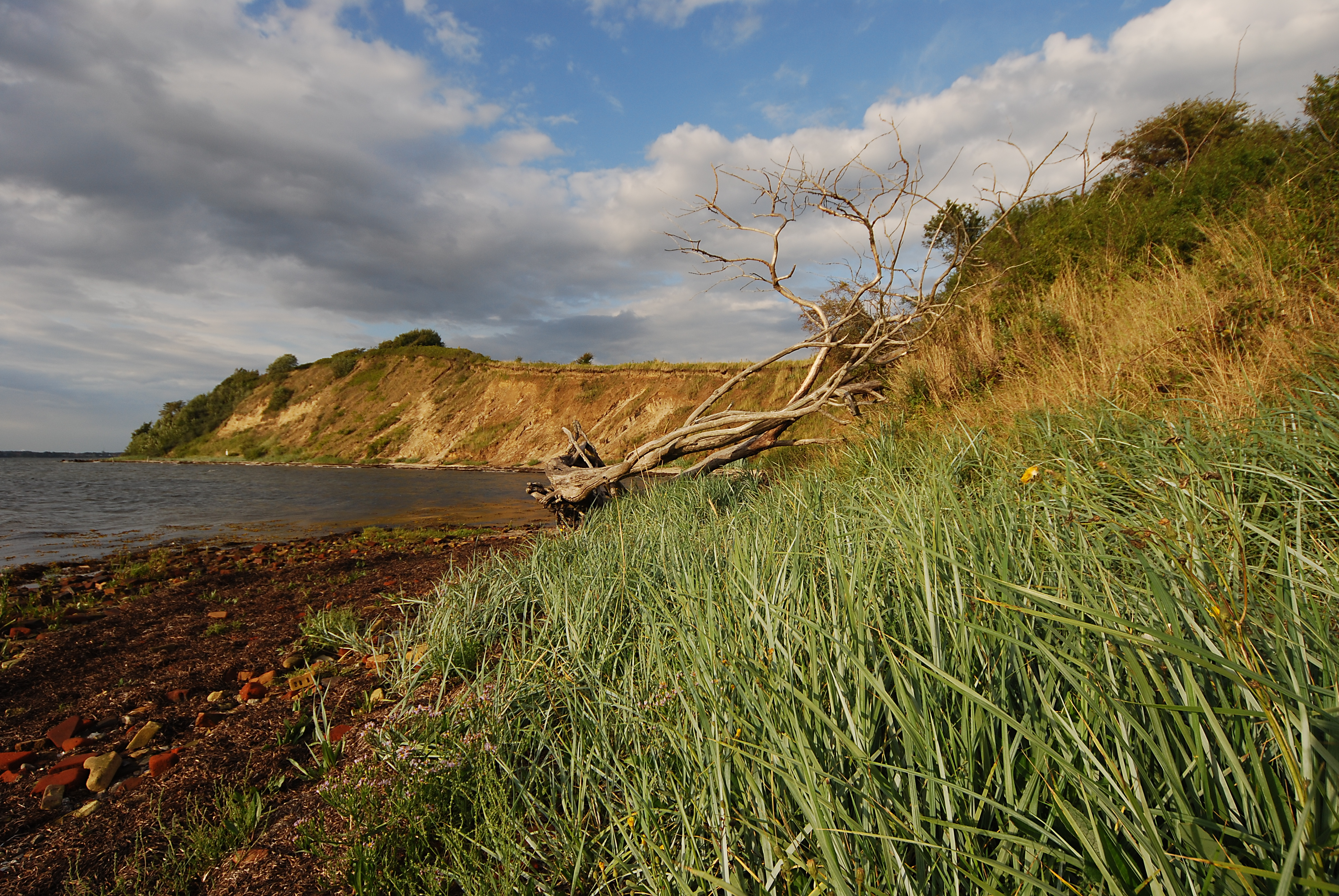 Naturschutzgebiet „Halbinsel Holnis“ im Kreis Schlewig-Flensburg in Schleswig-Holstein: Bedingt durch Stürme im Herbst und Winter wird am Holnis-Kliff die Steilküste, welche im Hintergrund zu sehen ist abgetragen.